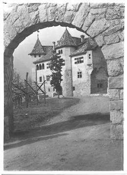 Albert Ellmenreich Stifterhof Obermais 1912